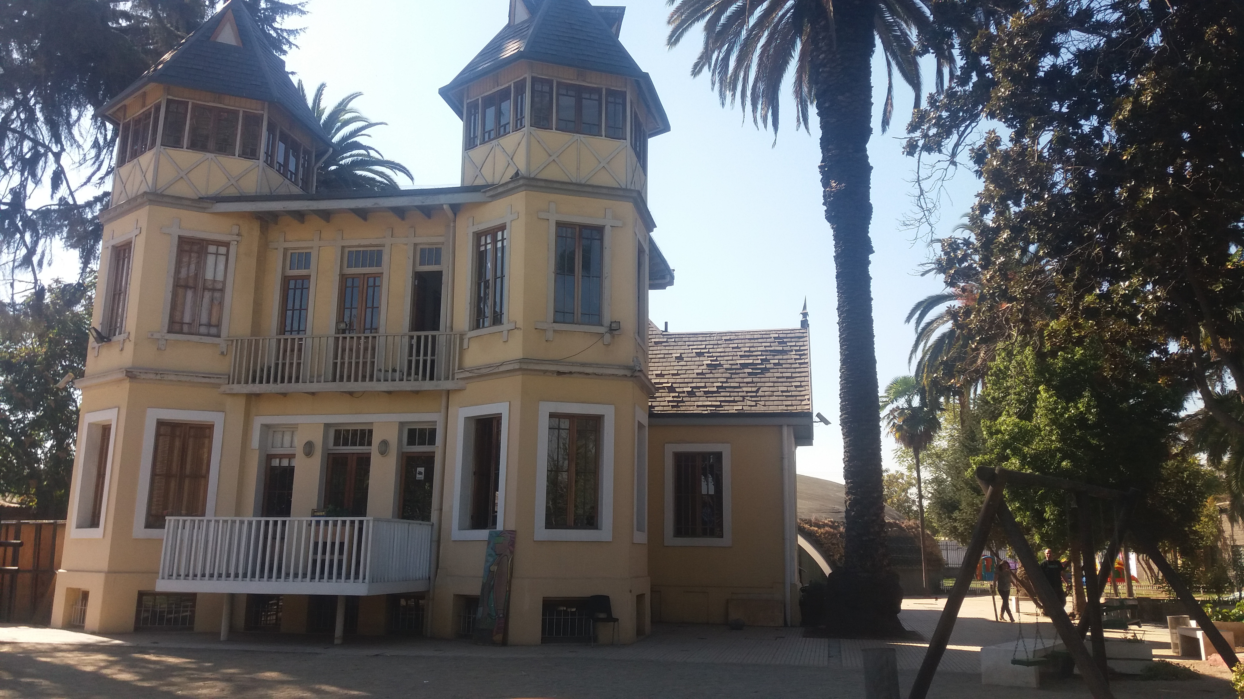 casona